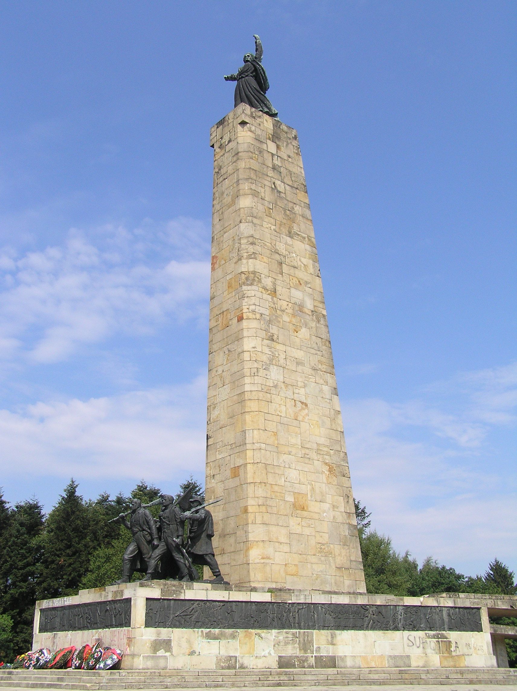 Ово је фотографија заштићеног природног добра у Србији под шифром: НП01 This is a a photo of a natural area in Serbia with ID: НП01 Fruška gora - spomenik na Iriškom vencu.